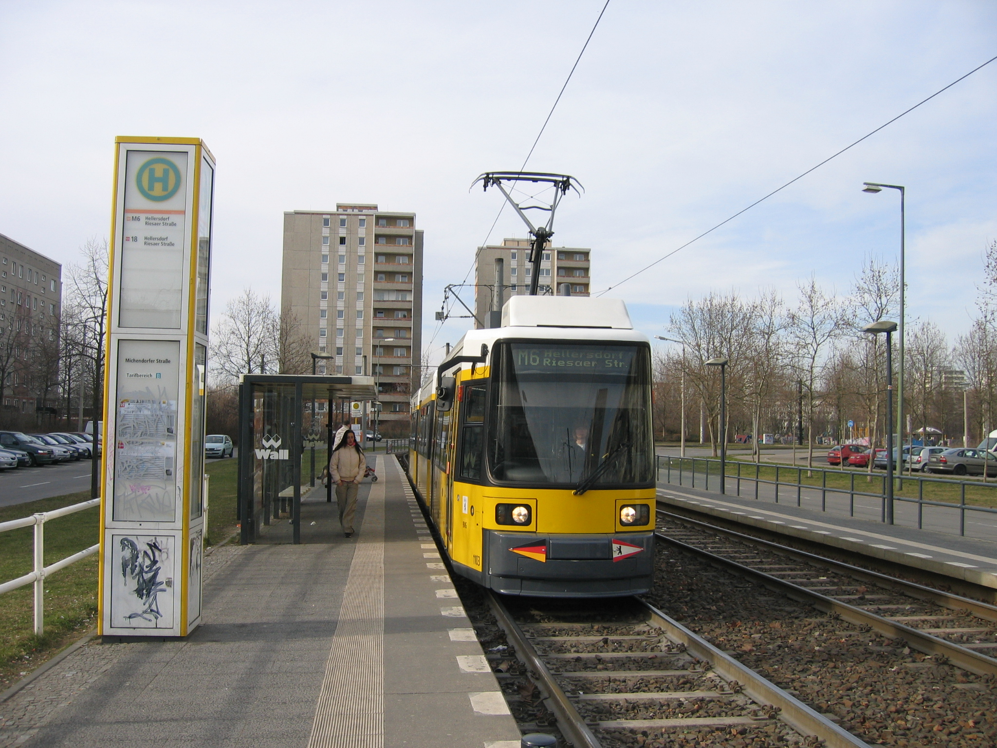 Straßenbahn M6 in Berlin-Hellersdorf.